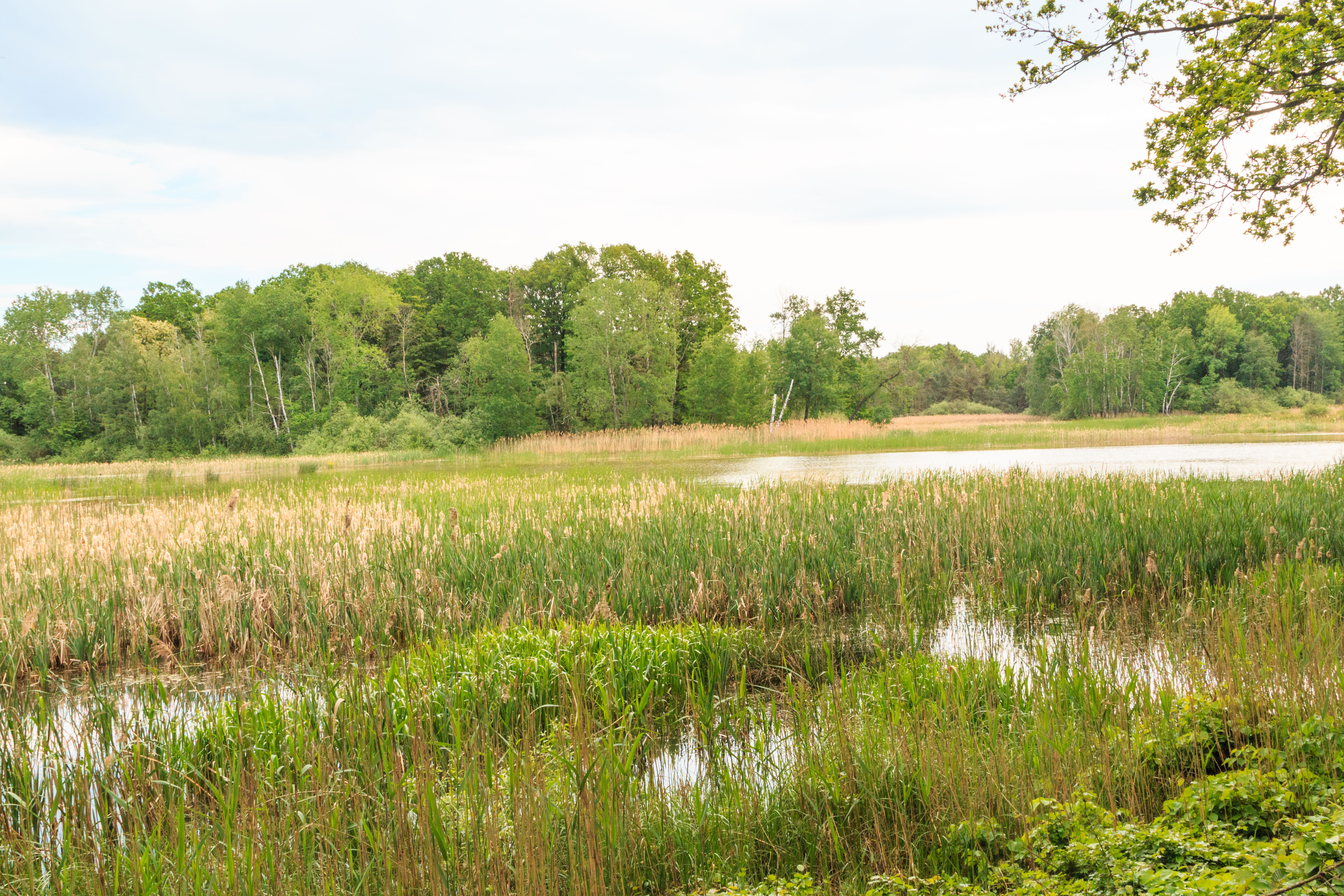 Rybník Smilek v PR Žernov Project: Vodstvo.